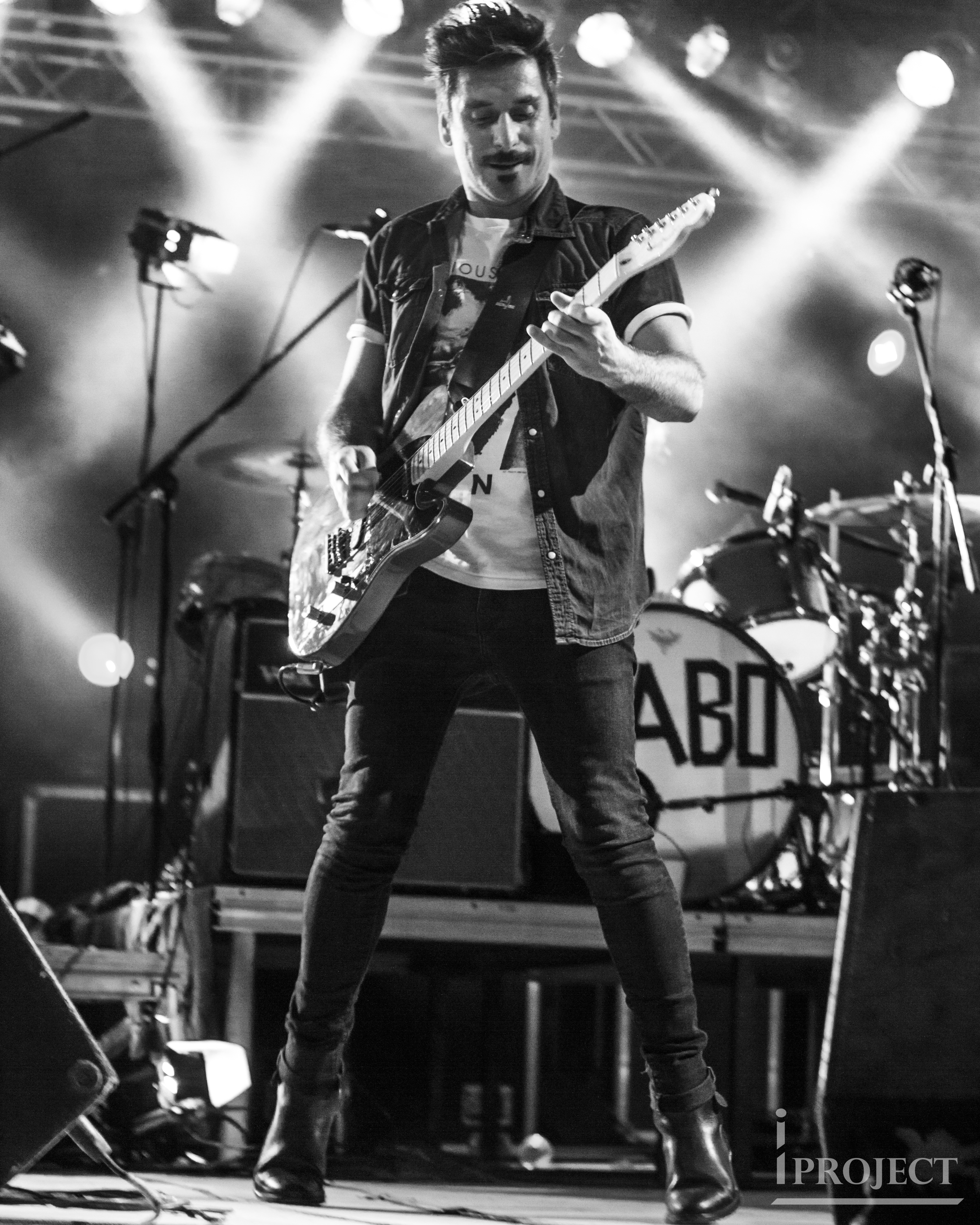 Jorge Cruz num concerto em Moura , Beja